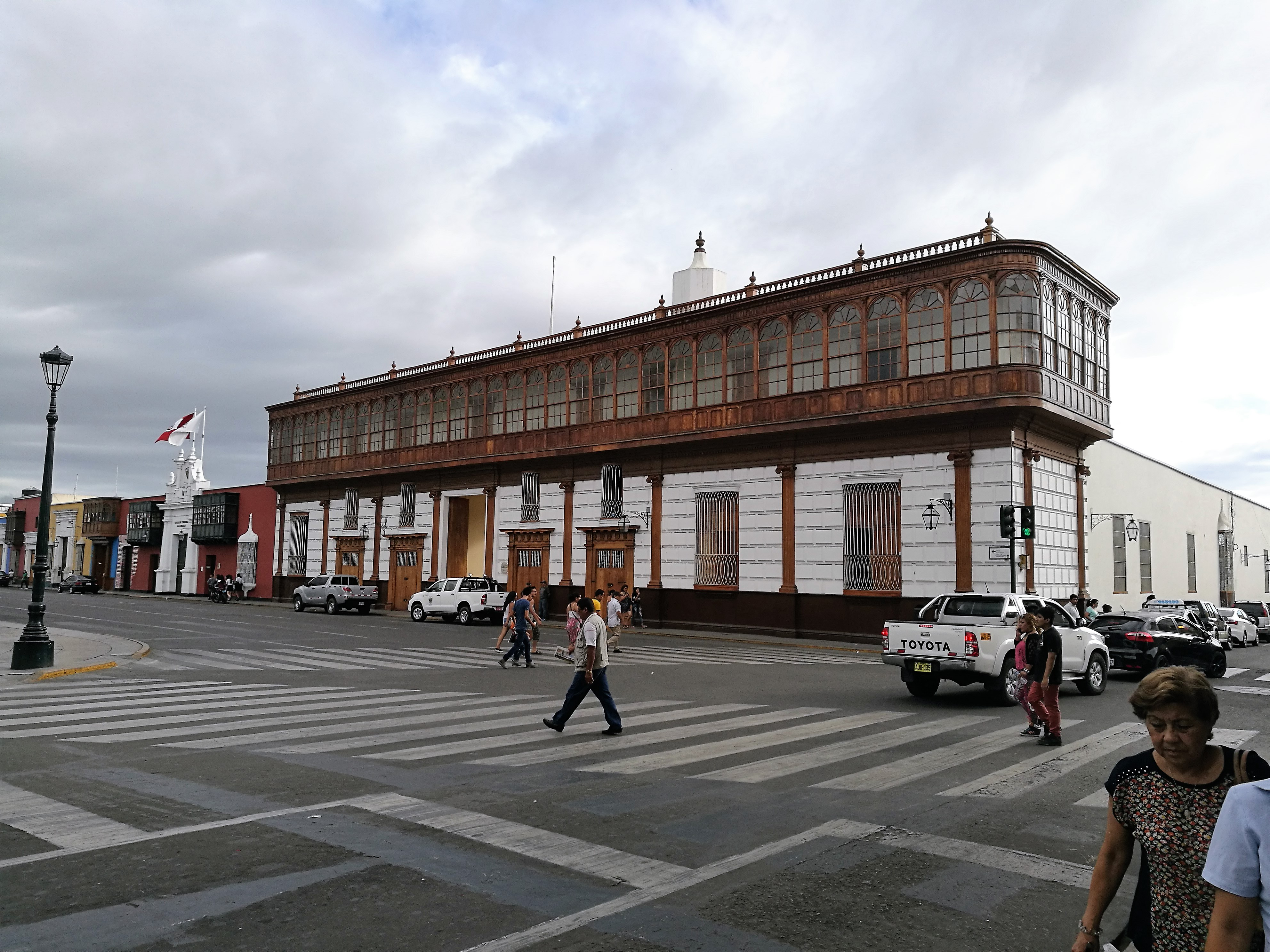 Edifici amb tribuna al jirón Almagro, a l'alçada de la Plaza de Armas de Trujillo